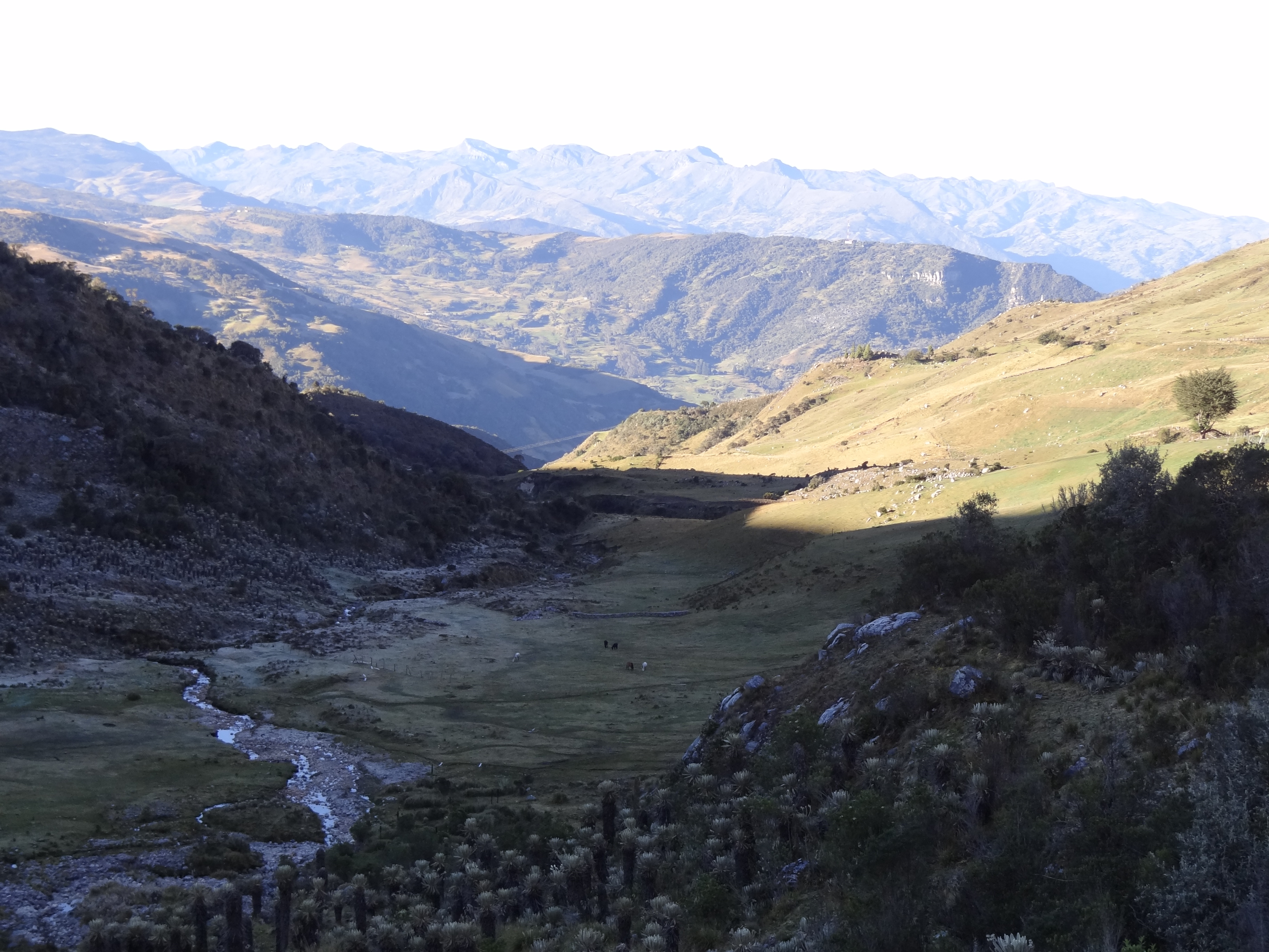 Sector del municipio de Guicán en el ascenso a la Sierra Nevada del Cocuy, departamento de Boyacá, Colombia